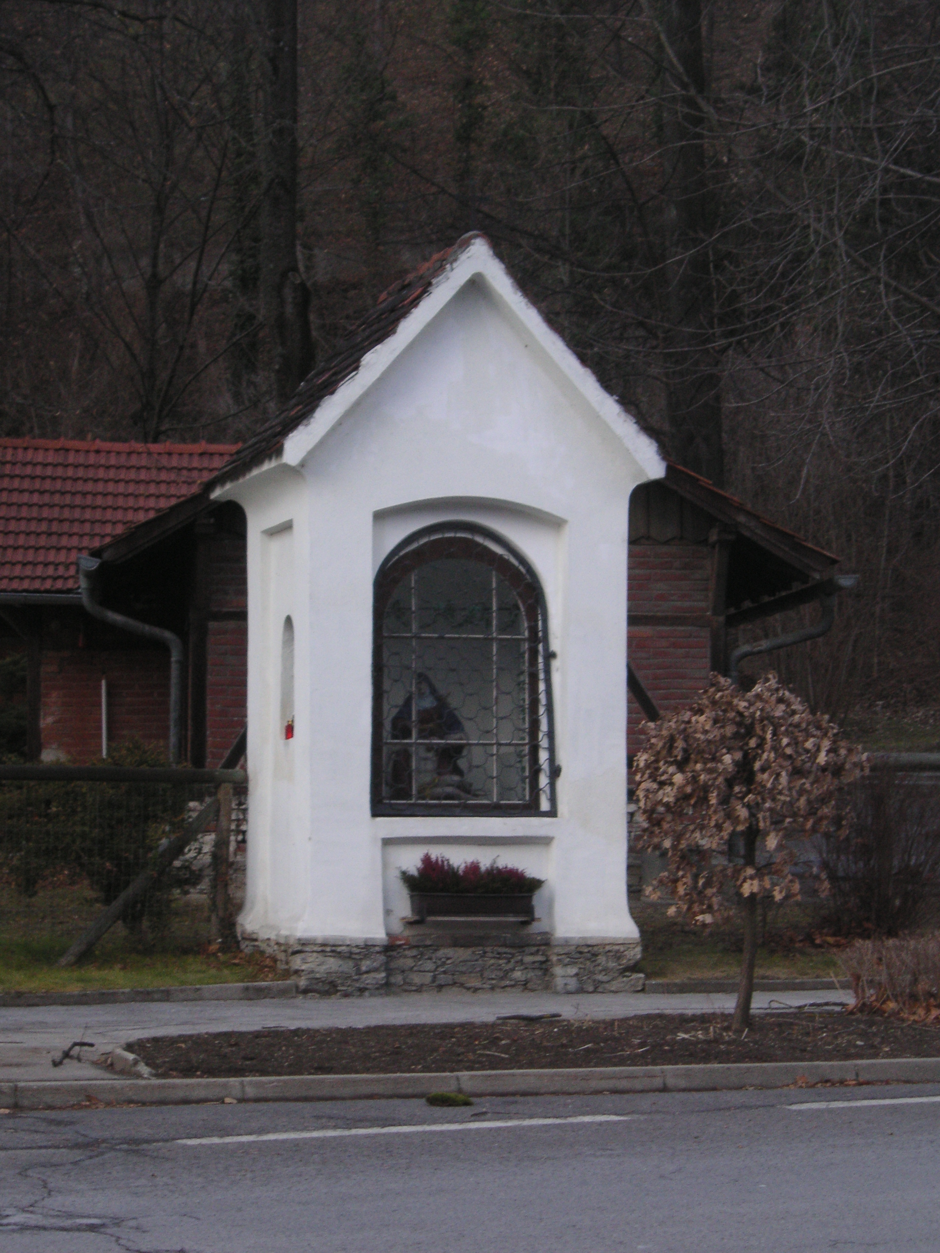 Bildstock